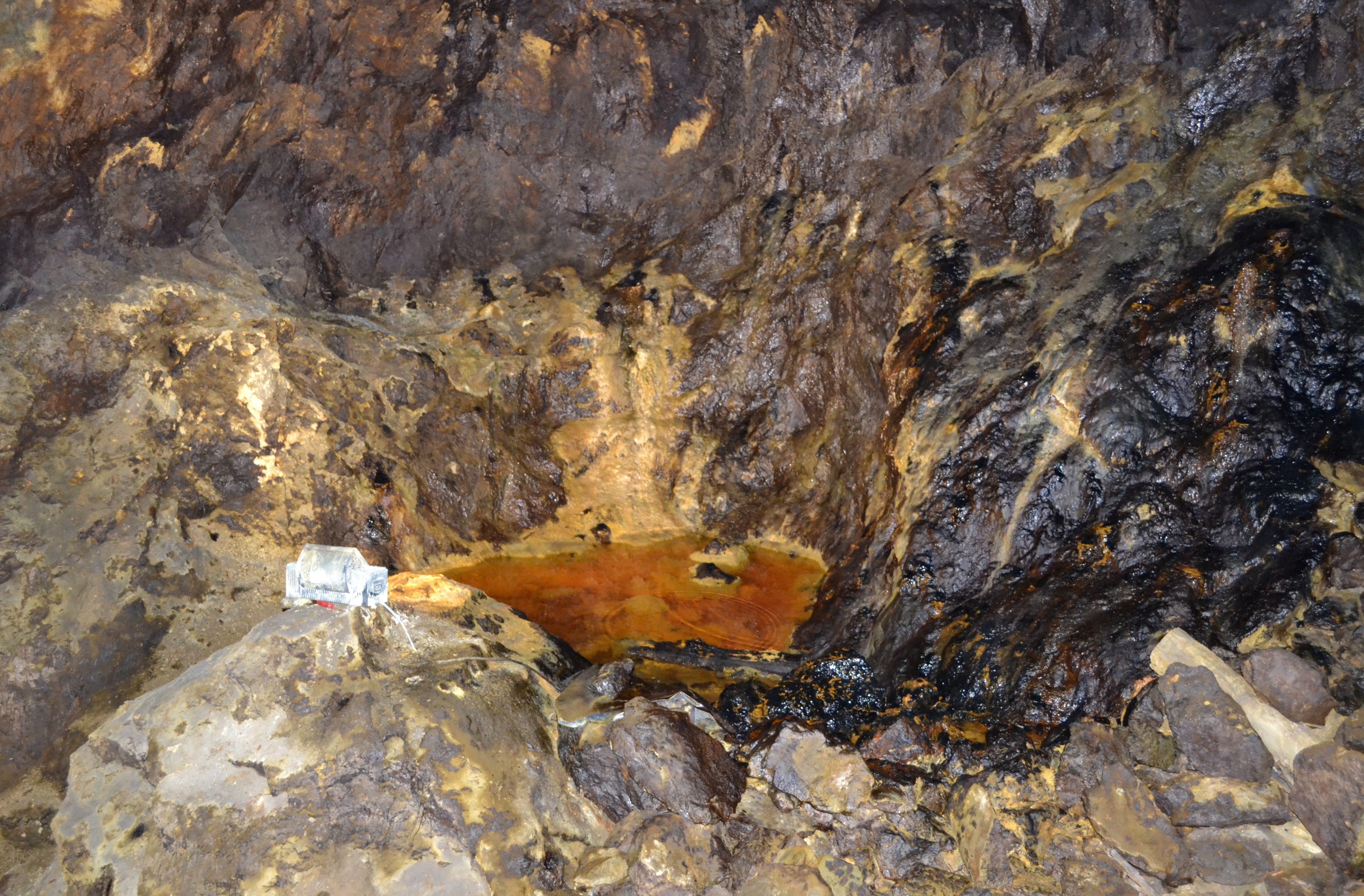 Das ehemalige Bergwerk am Silberberg (Bodenmais, Bayerischer Wald).